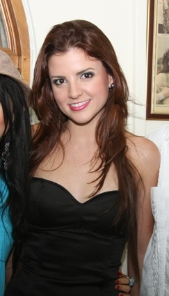 foto de sara tunes en neiva